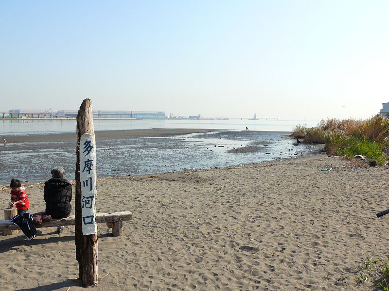 河川管理上の河口はここから数百メートル下流の多摩運河上（殿町と浮島町との境界付近）に設定されている。